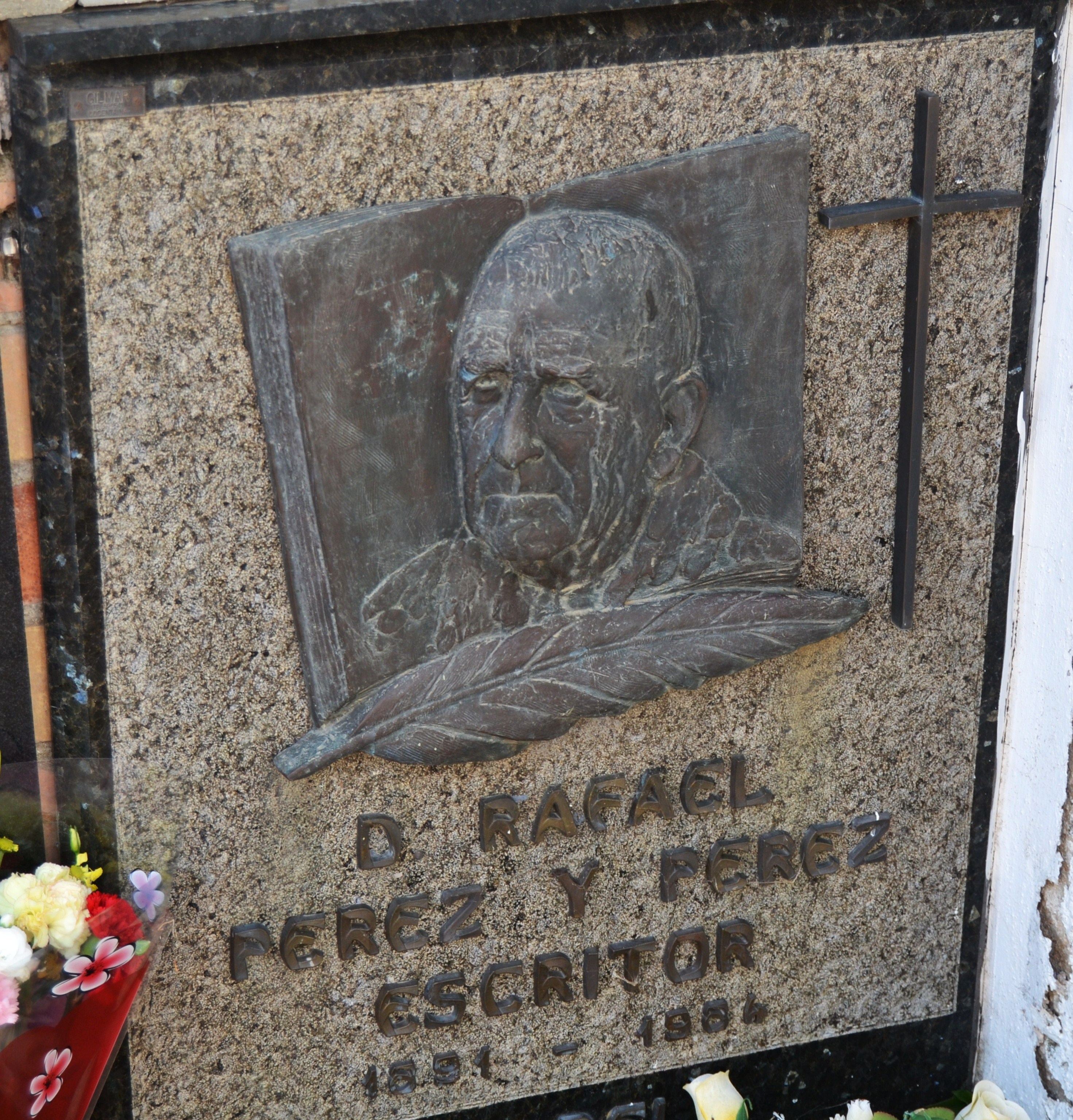 Làpida de l'escriptor Rafael Pérez i Pérez, cementeri de Quatretondeta.